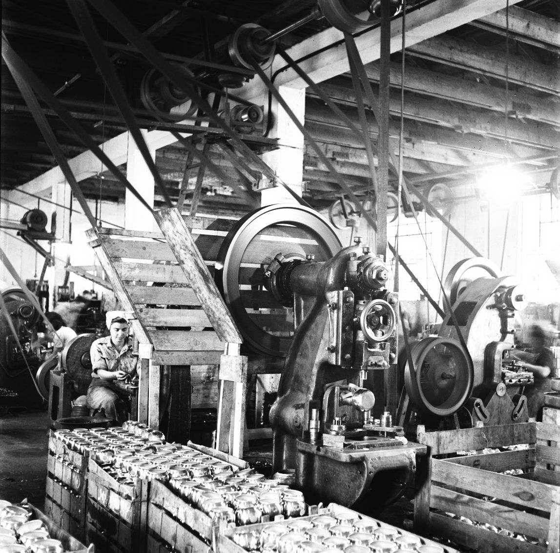 אוסף צילומים של הצלם זולטן קלוגר טווח מספרי התשלילים 29294 - 30007: בית חרושת "פלאלום"